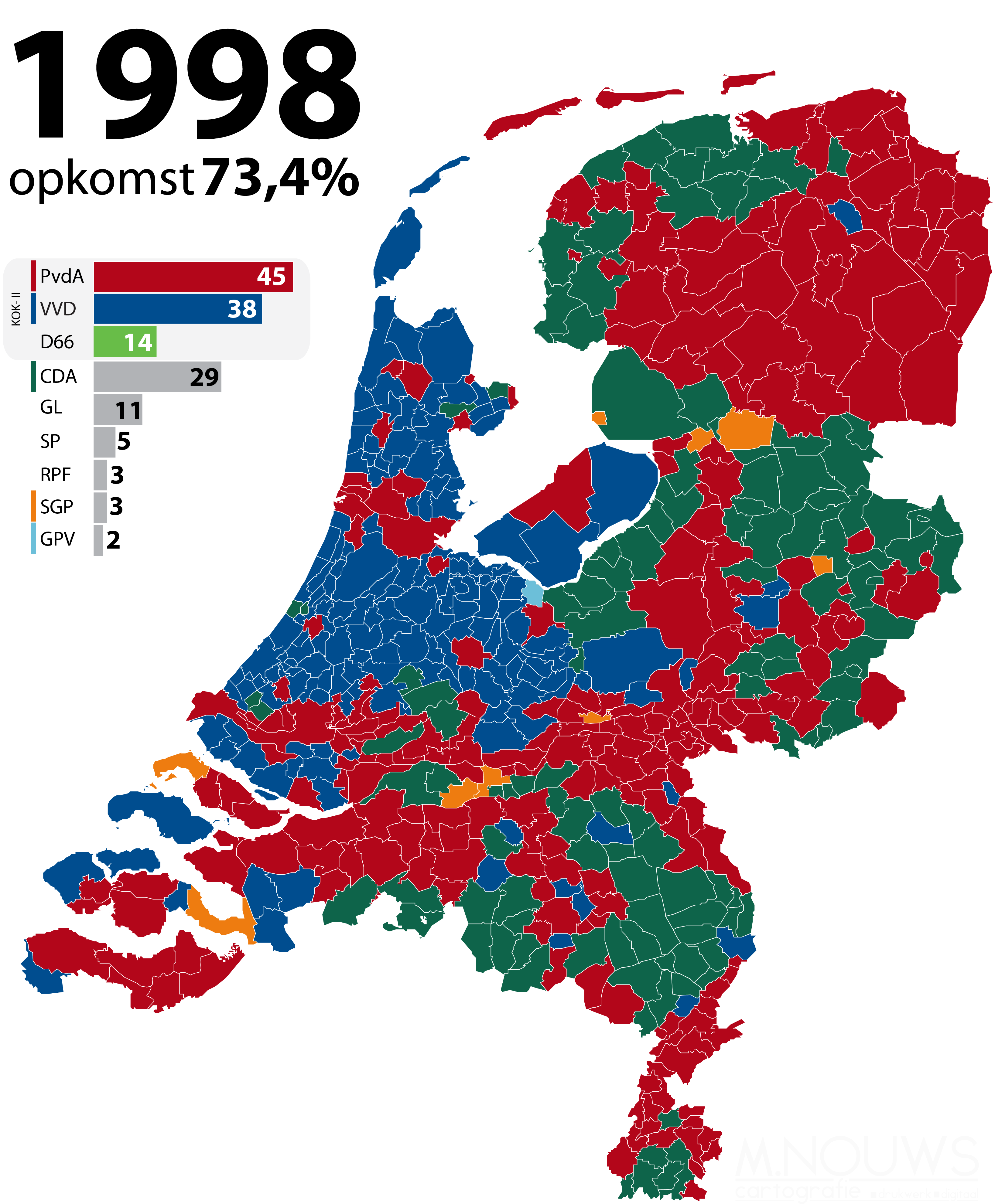 Grootste politieke partij per gemeente, zetelverdeling en kabinetscoalitie bij Tweede Kamerverkiezingen 1998